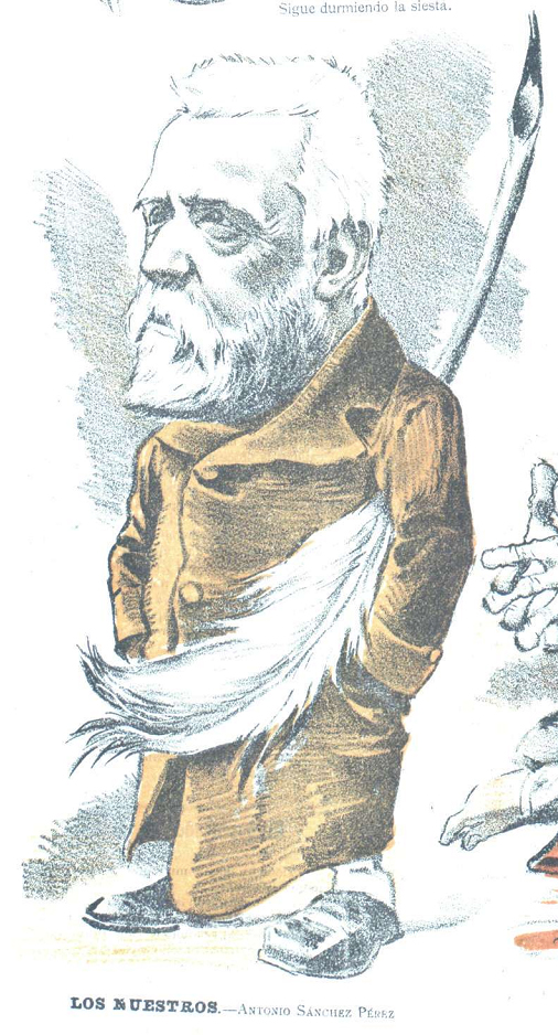 Caricatura.